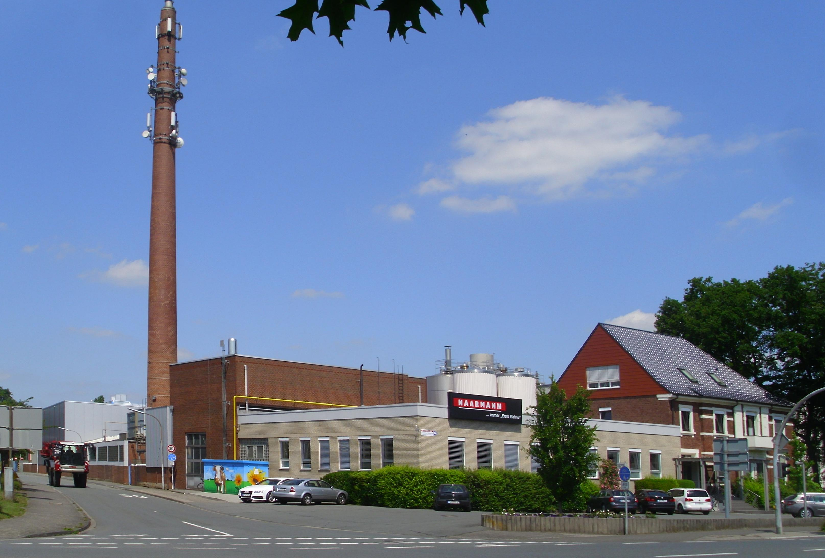 Molkerei Naarmann in Neuenkirchen (Kreis Steinfurt)